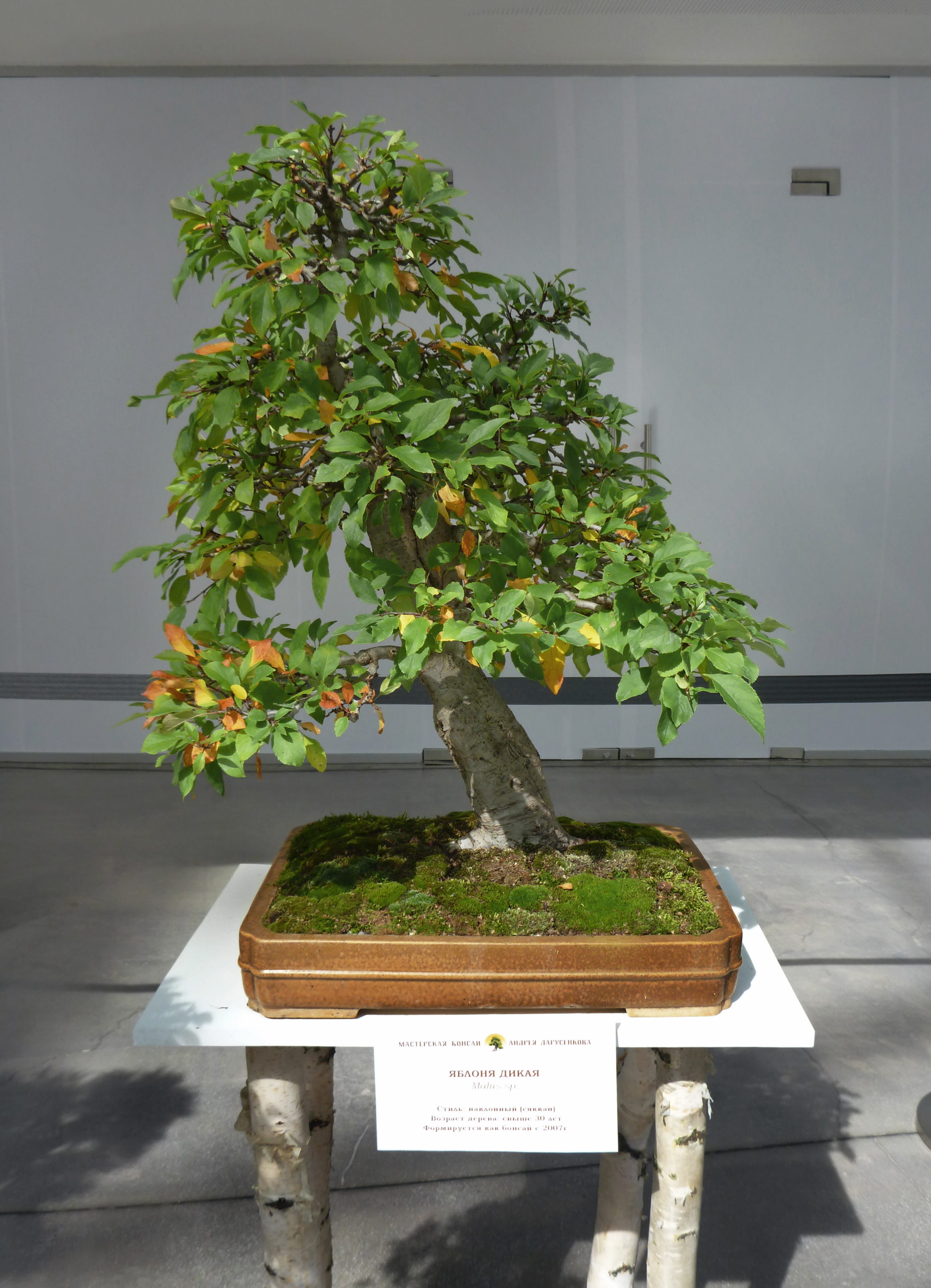 Яблоня дикая в форме бонсай в Ельцин-центре 2019 год